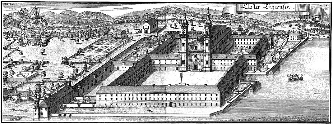 Tegernsee, Ansicht des Klosters Tegernsee auf dem Kupferstich (um 1705) von Michael, in der Mitte im Hintergrund die 1803 abgebrochene Pfarrkirche für die Klosterbediensteten und die Landbevölkerung.